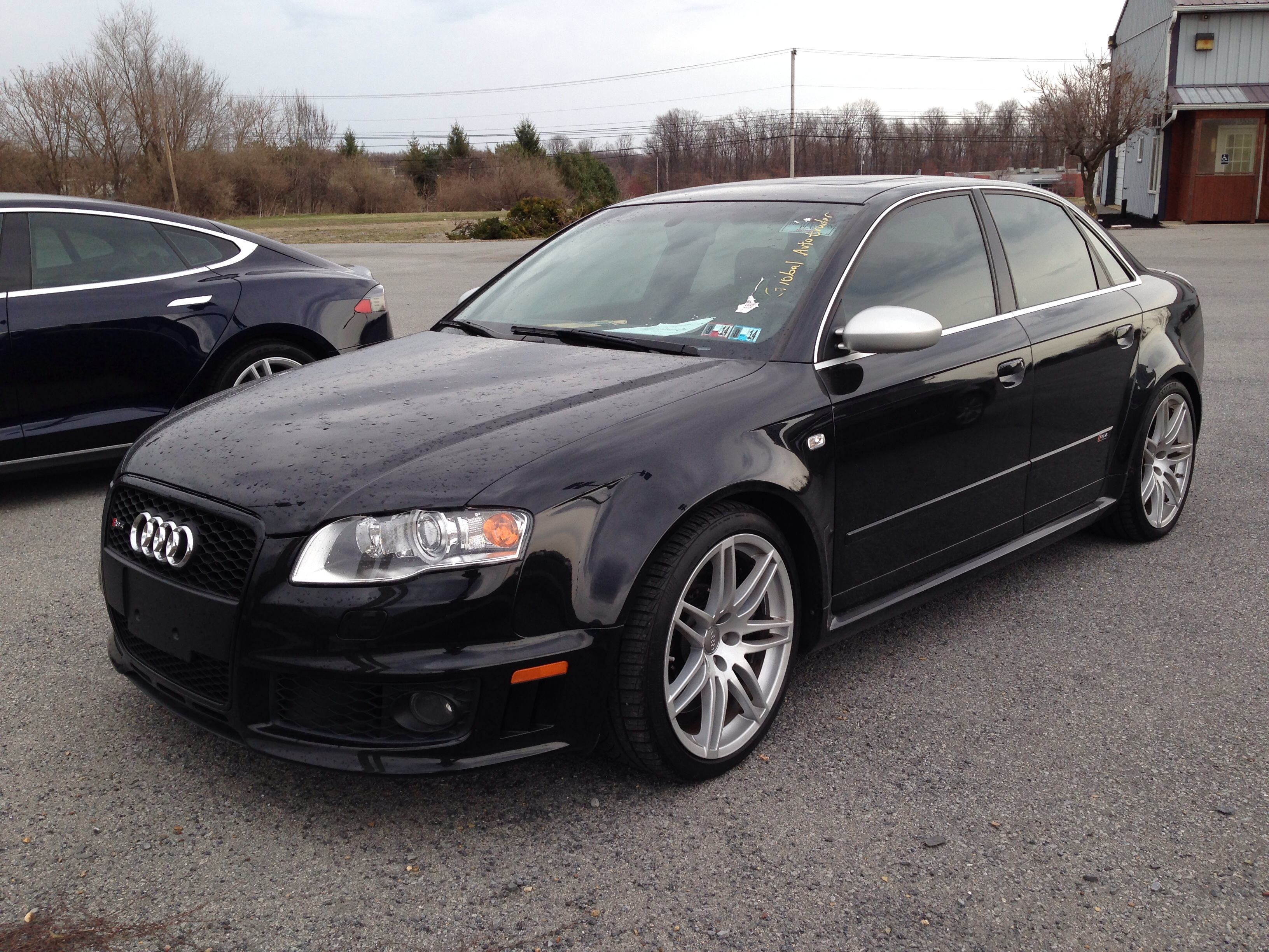 Audi RS4